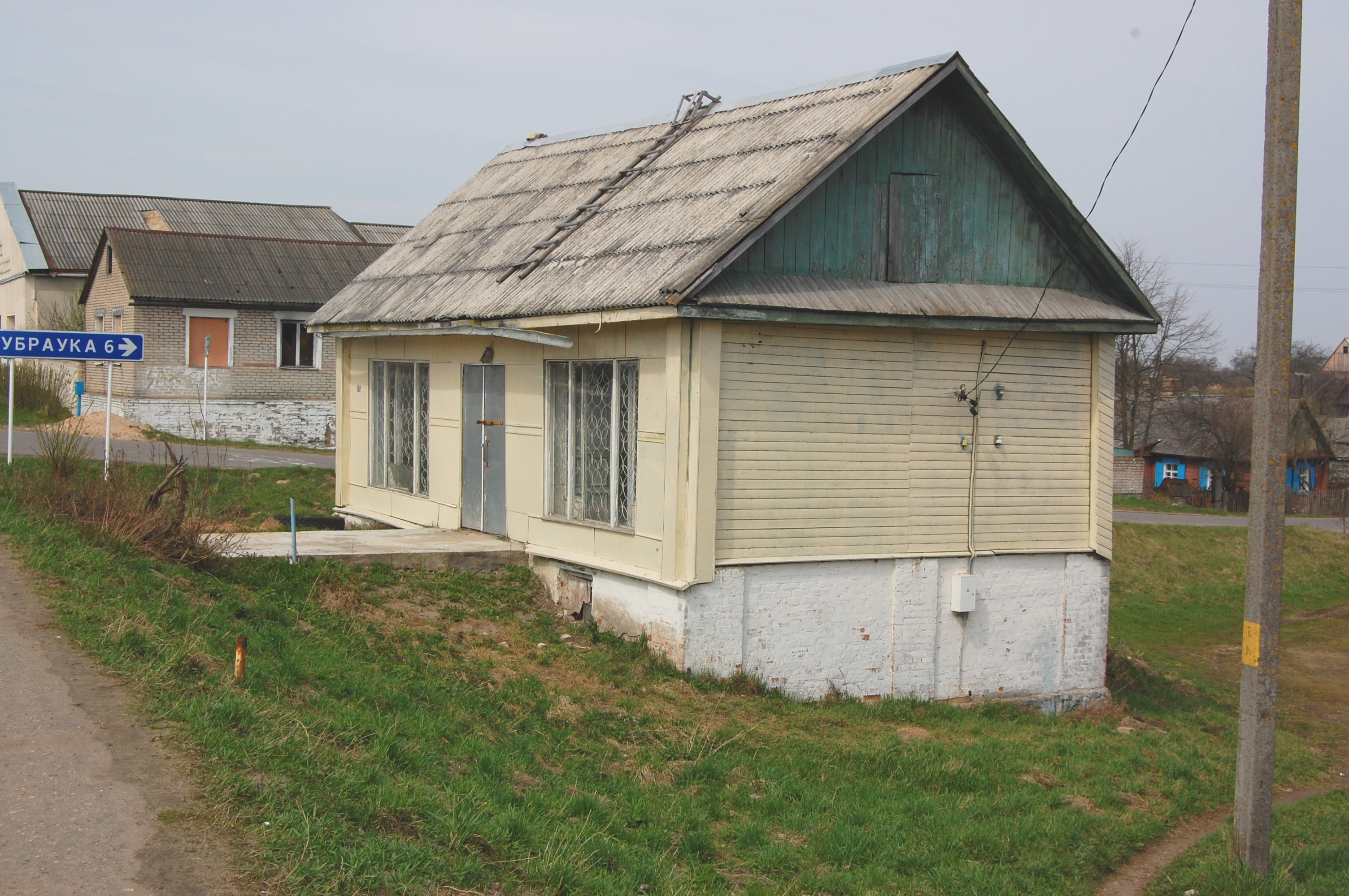 Ветрино, Полоцкий район. От бывшей синагоги остался только фундамент.